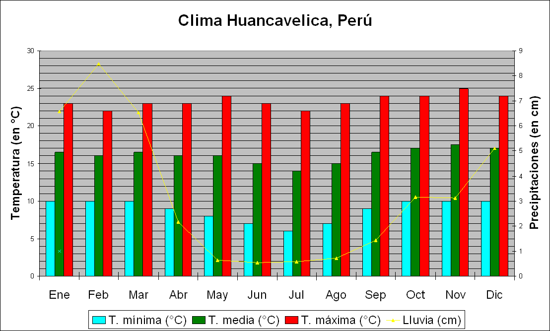 Clima de Huancavelica, Perú